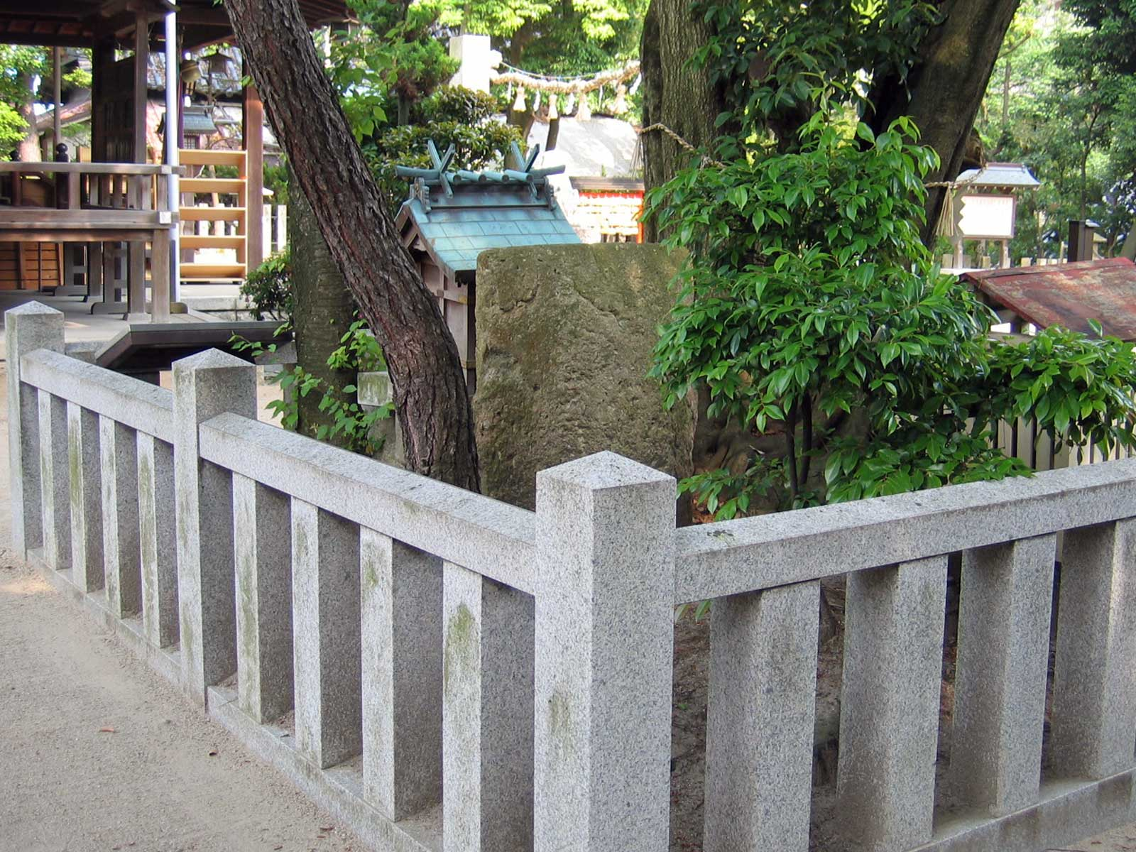 素盞鳴命神社 (吹田市) 通称・江坂神社 石棺蓋